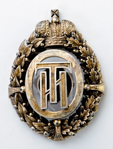 Знак об окончании Санкт-Петербургского практического технологического института.